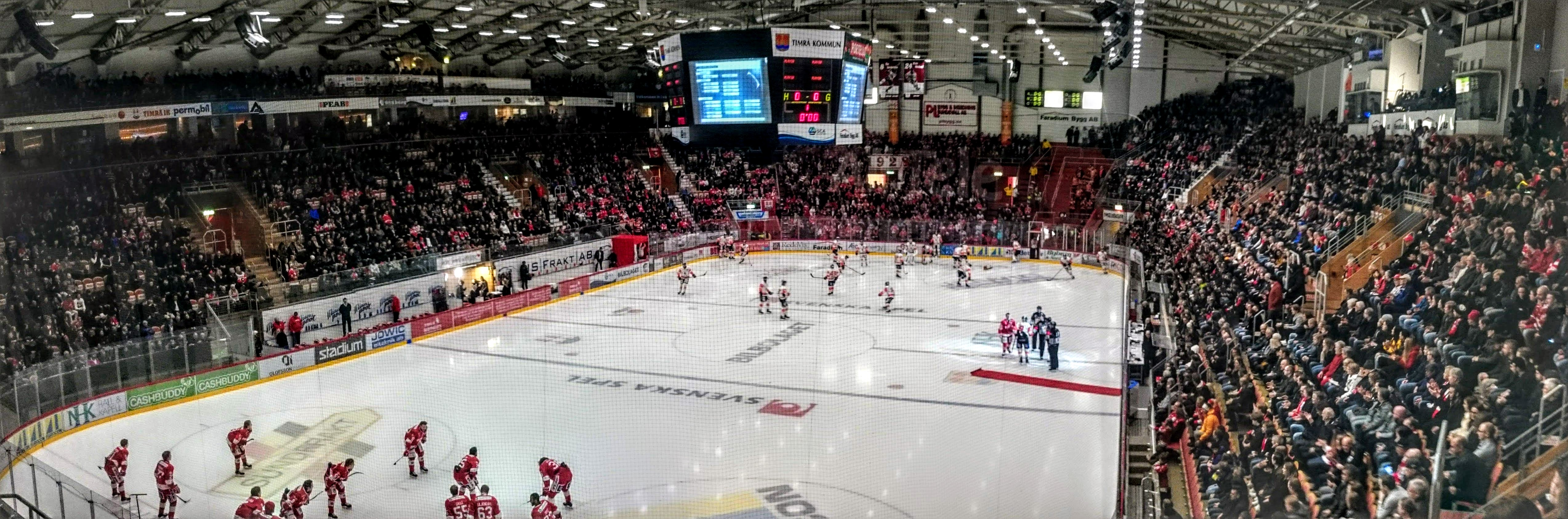 Panorama bild från uppvärmningen mellan Timrå IK och Karlskrona Hk match 4:7.